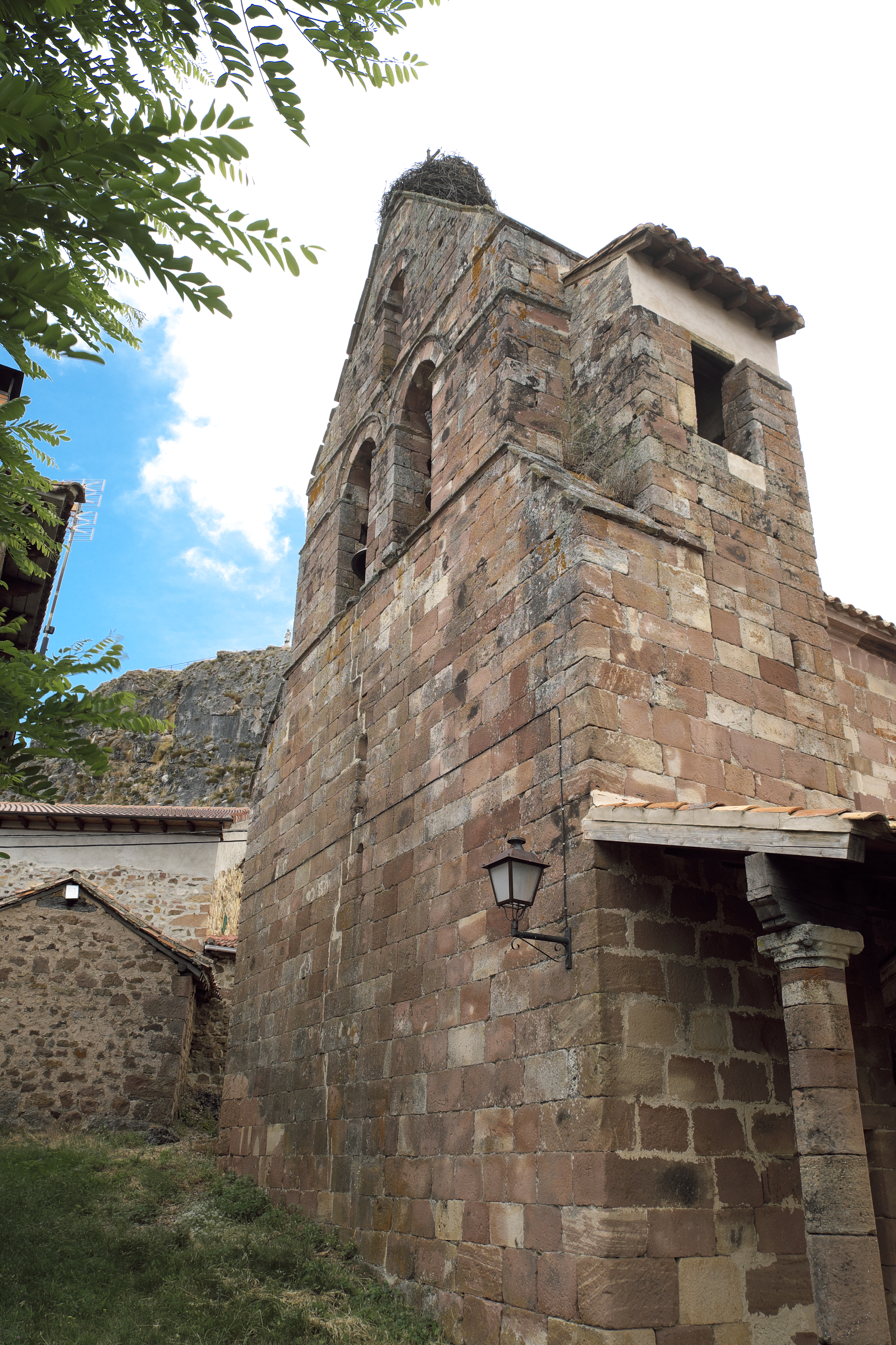 Katholische Pfarrkirche San Martín in Mudá in der Provinz Palencia (Kastilien-León/Spanien), offener Glockenturm (Espadaña)